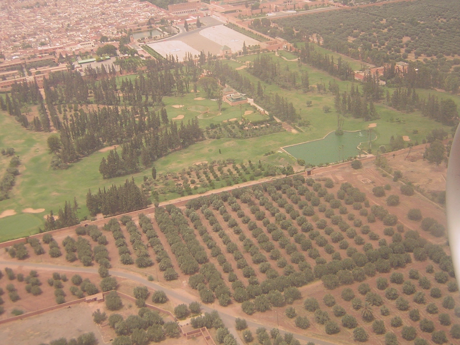 Agdal Gardens